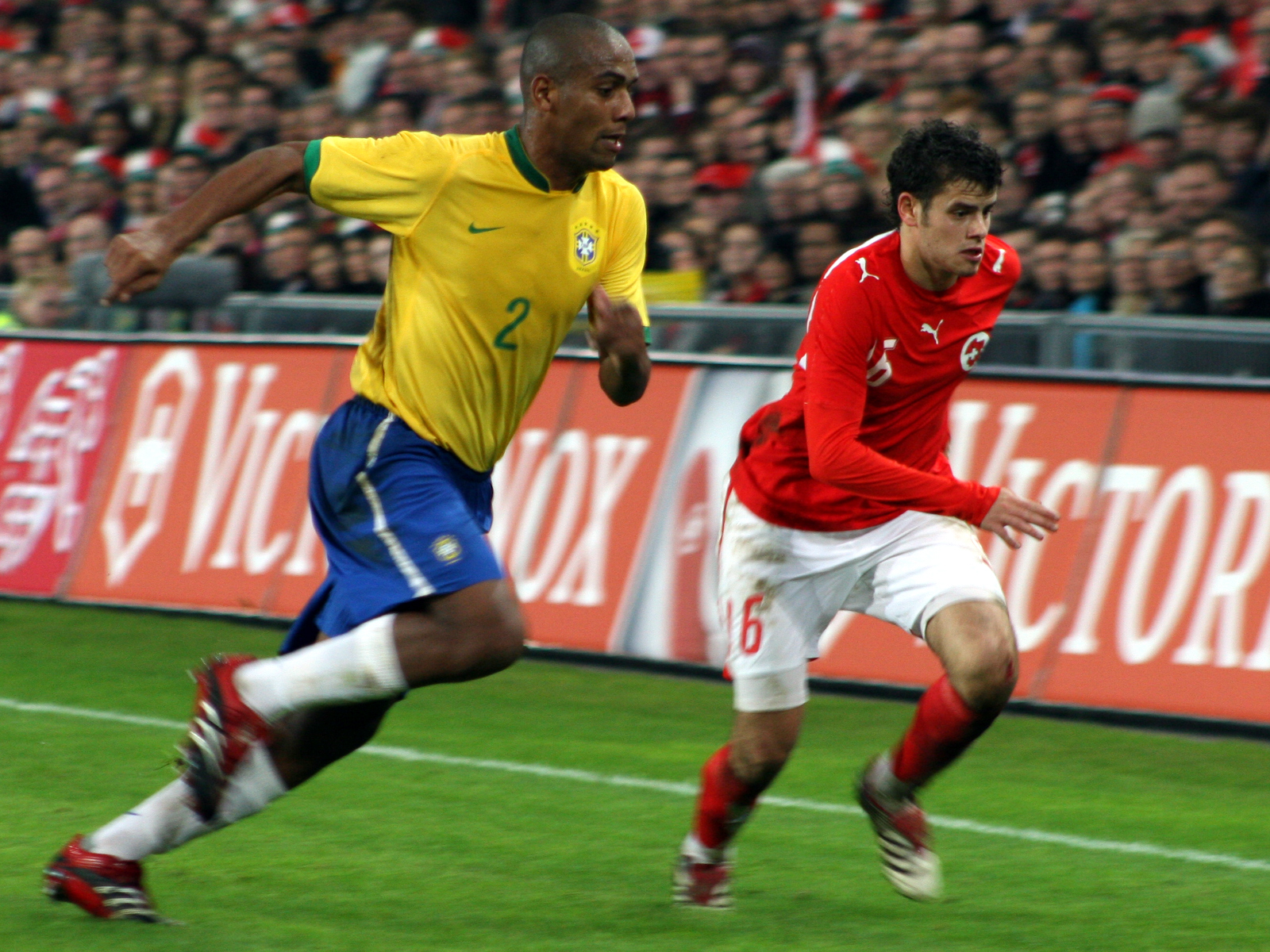 Tranquillo, St. Jakob Stadion, Basel (Switzerland), Switzerland - Brasil 1:2